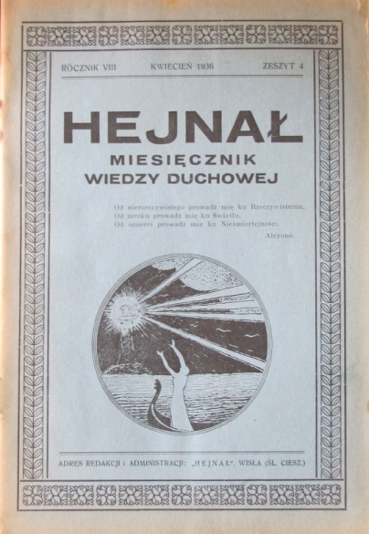 "Hejnał" Miesięcznik Wiedzy Duchowej wydawany w latach 1929 - 1939 przez Oficynę Wydawniczą "Hejnał" w Wiśle